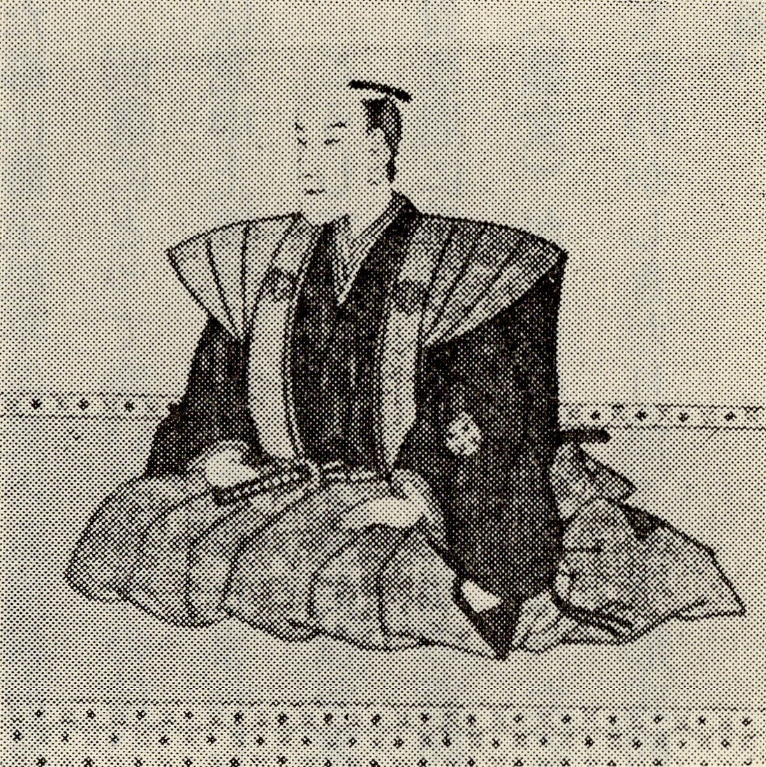 中川久貴の肖像(モノクロ)。